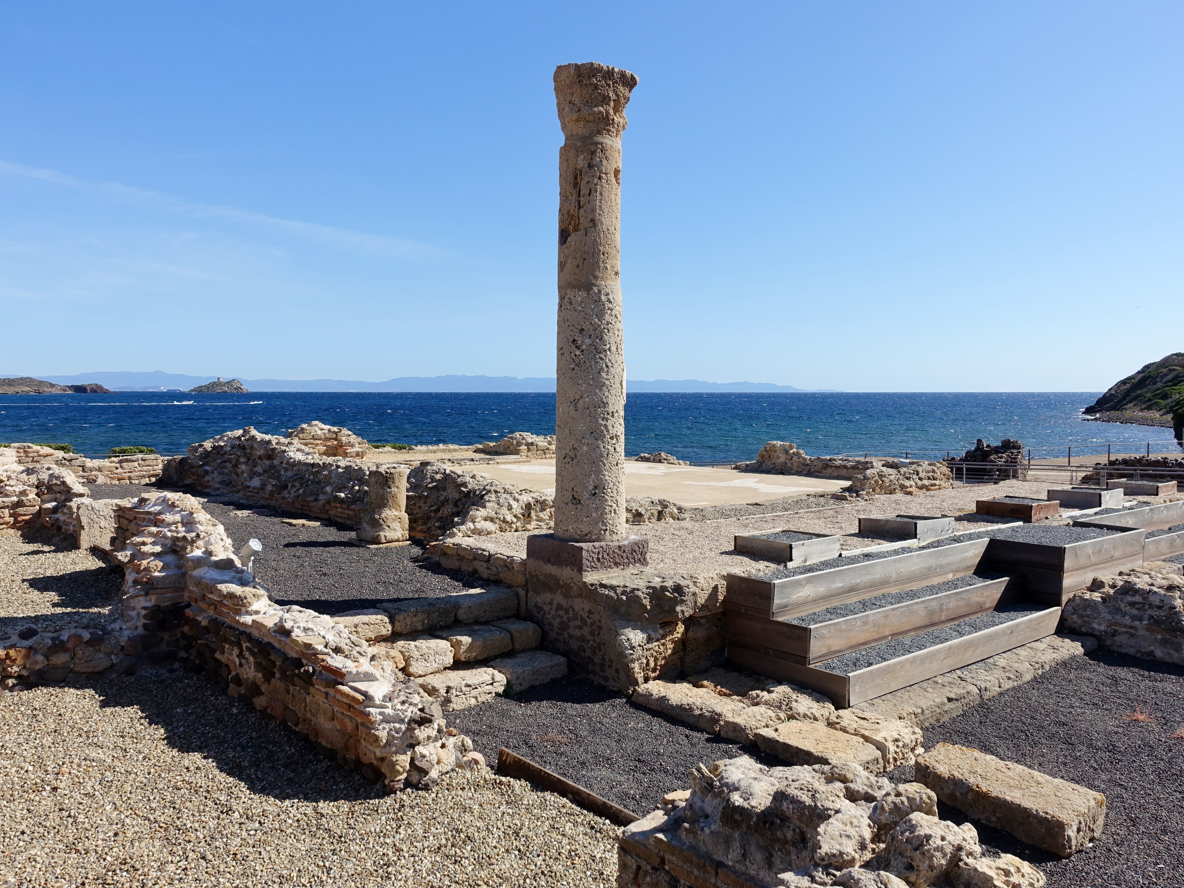 Archäologische Ausgrabungsstätte von Nora, Gemeinde Pula, Sardinien, Italien